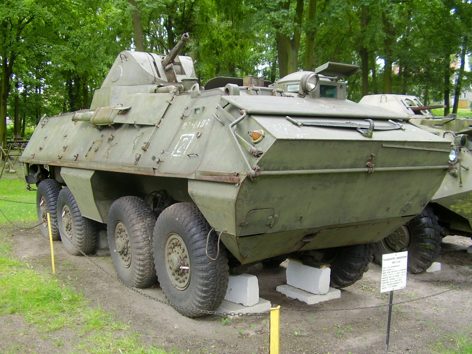 Transporter Opancerzony SKOT-2 AP z 4 Pomorskiej Dywizji Zmechanizowanej